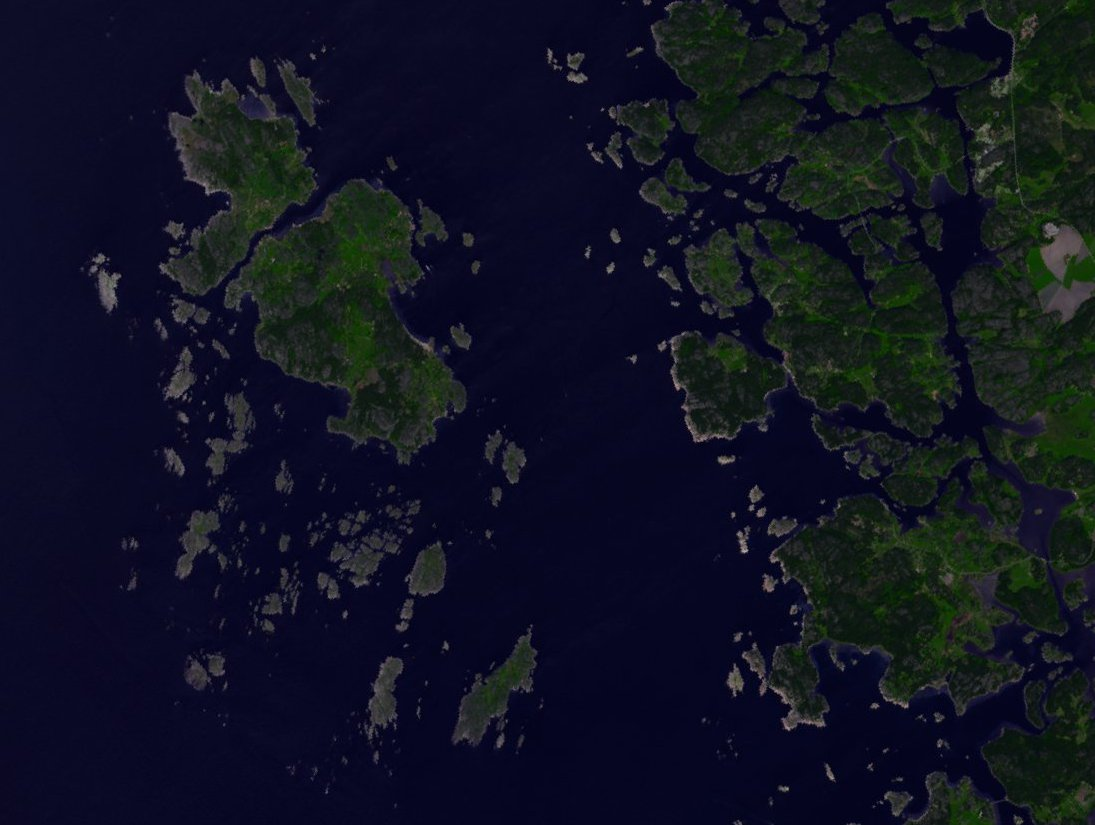 Photo Aster (NASA) du 25 mai 2004 montrant la côte et l'archipel des Koster, dans le parc national de Kosterhavet.